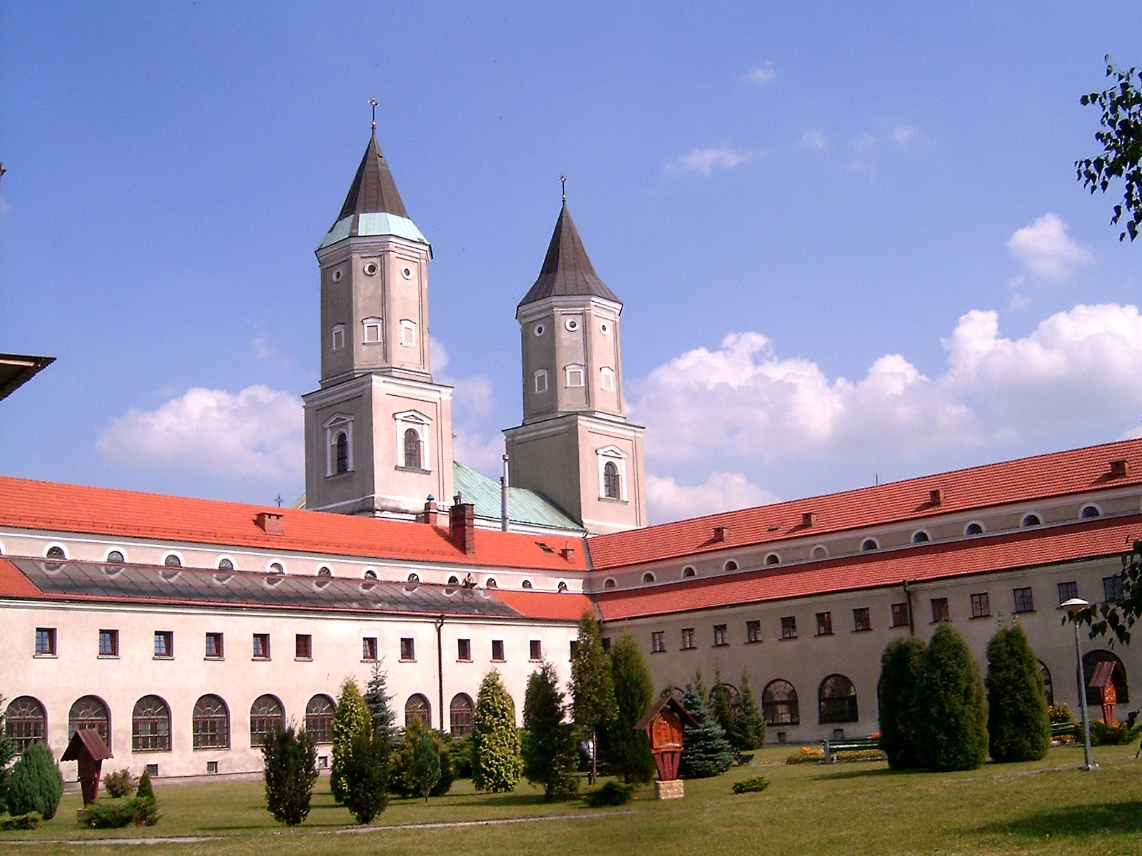 opactwo sióstr Benedyktynek, klasztor i kościół, Jarosław